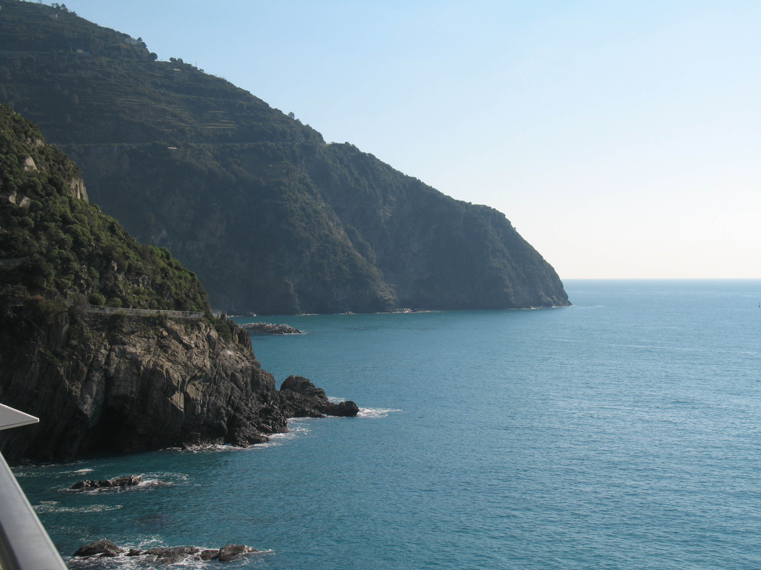 Immagine dalle Cinque Terre Via dell'Amore